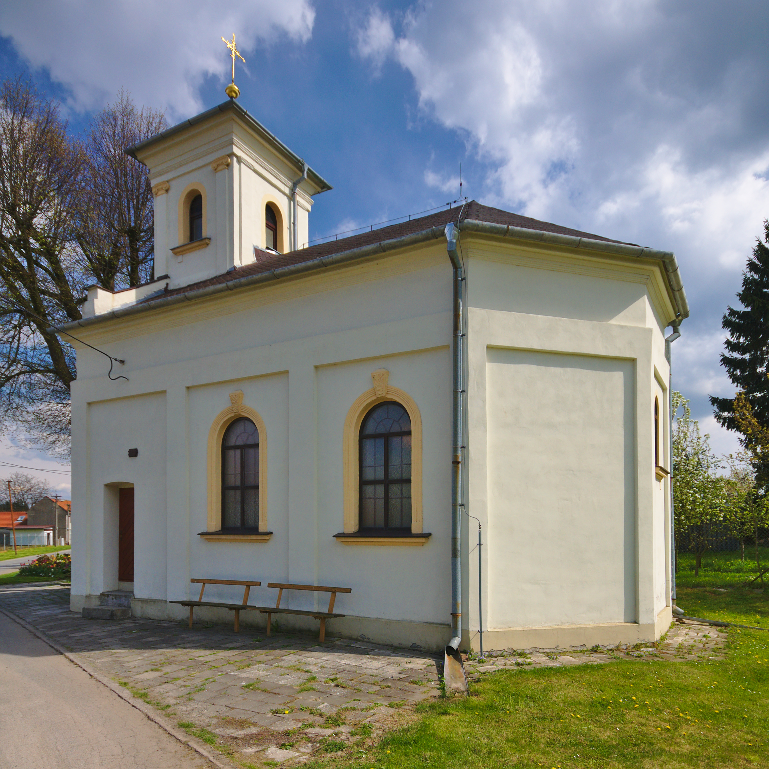 Kaple svatého Floriána, Vincencov, okres Prostějov